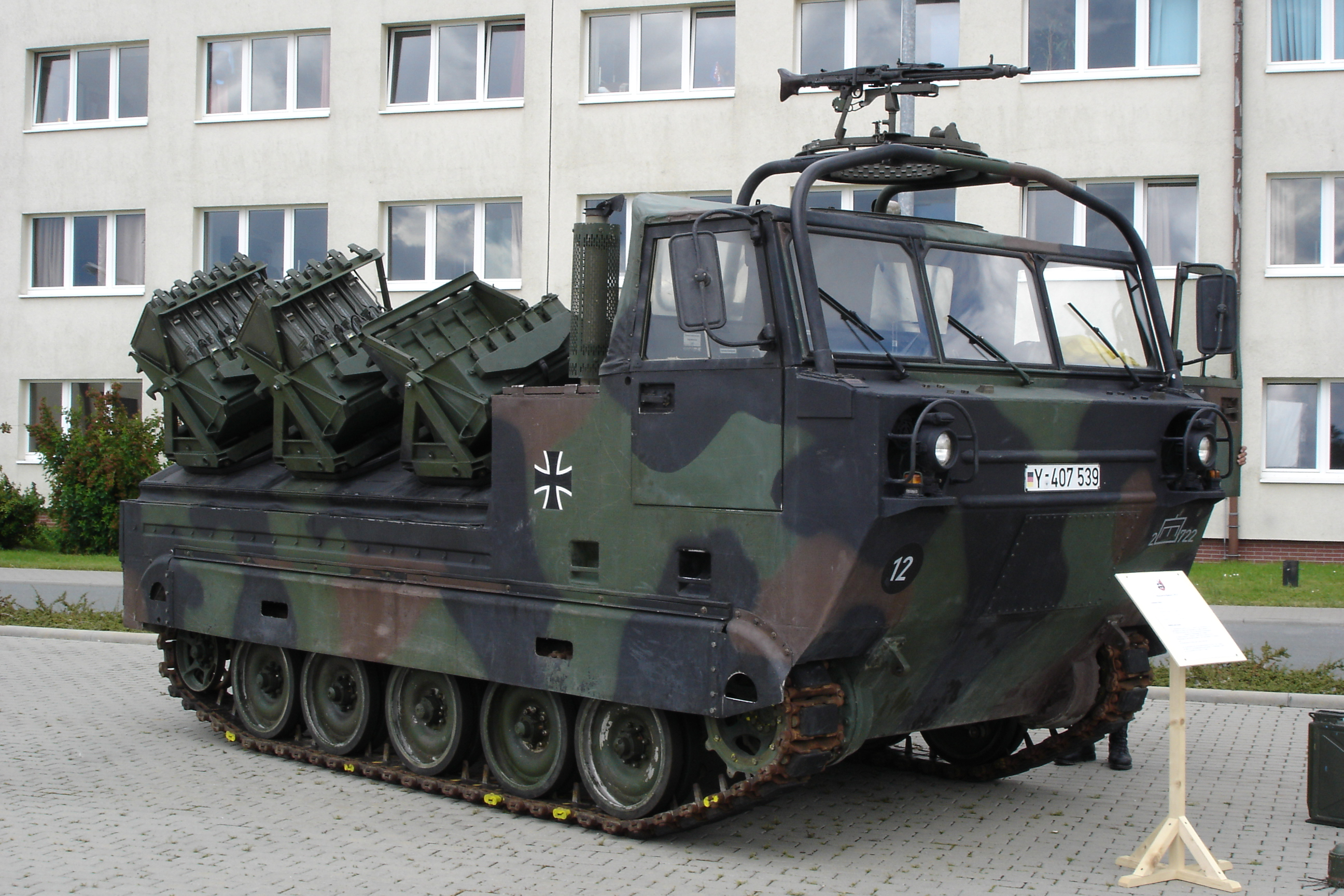 Minenwurfsystem "Skorpion" des 2./ PiBtl 722 in Gera (2004)